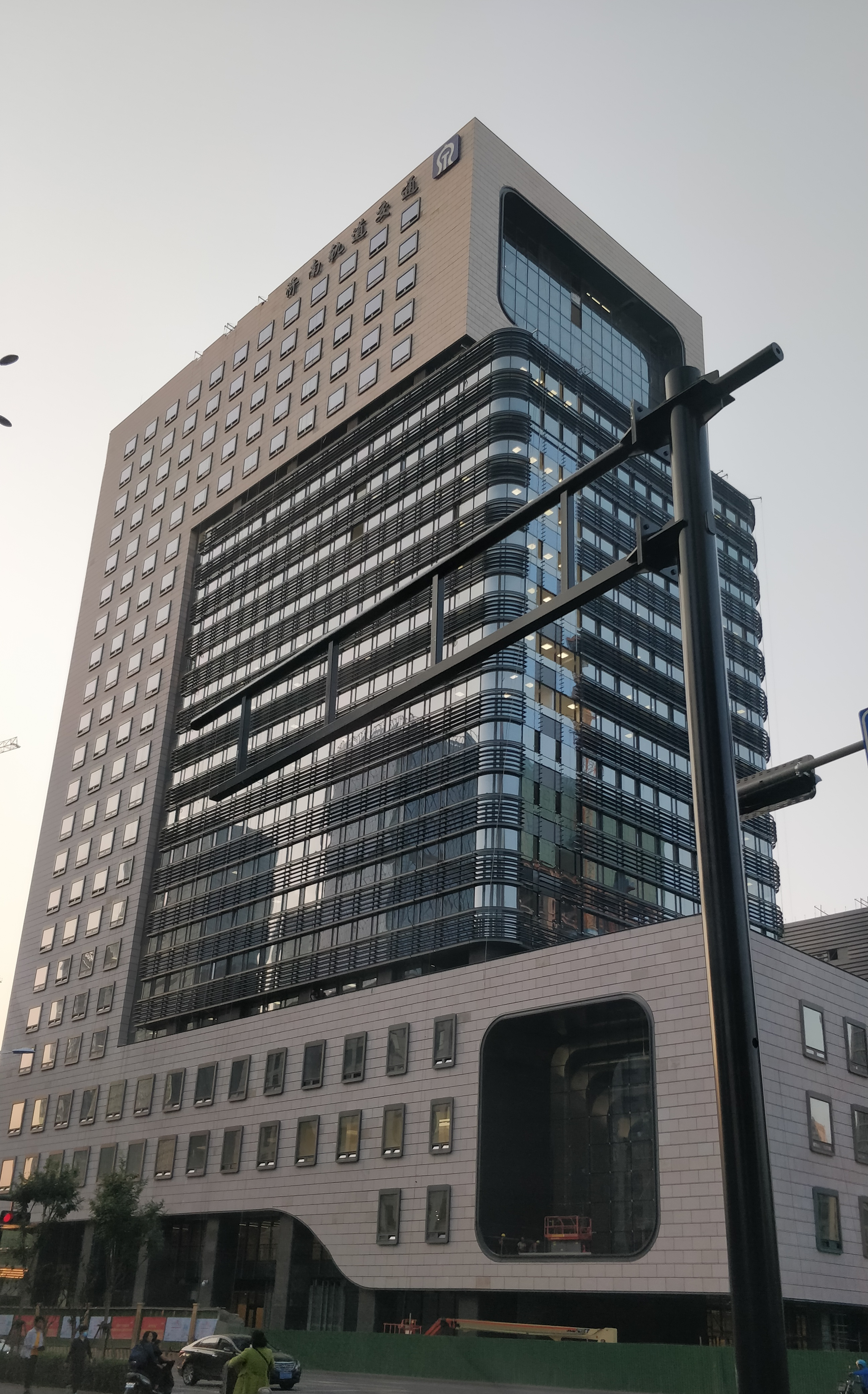 中文（中国大陆）: 济南轨道交通大厦